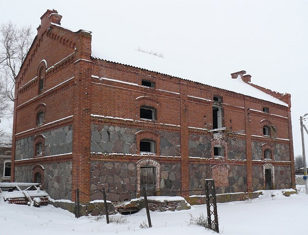 хозпостройка, д.Пламя, Сенненский район, Витебская область. Фото путешествия по Беларуси.